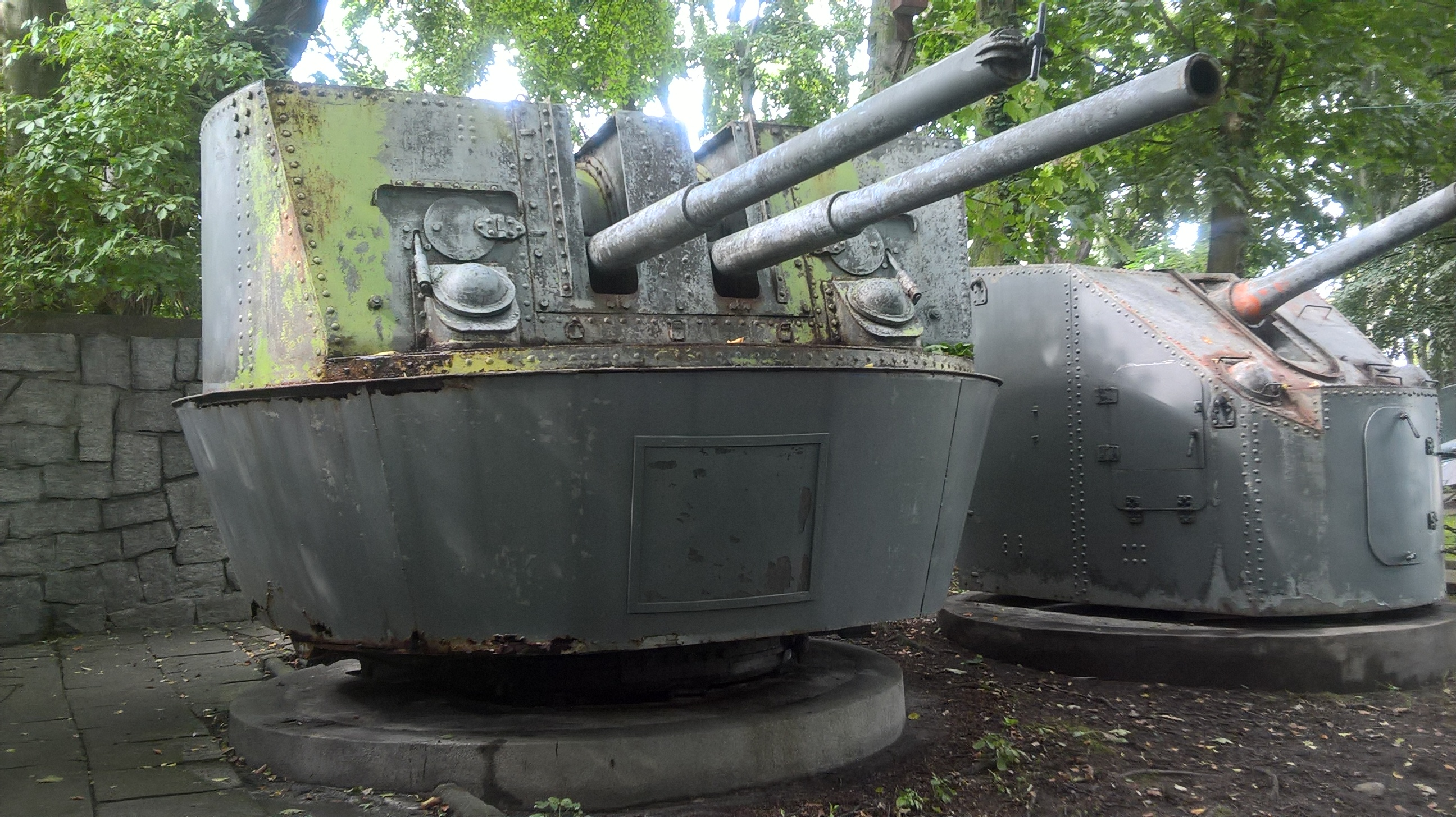 Podwójnie sprzężona radziecka armata morska 92-K kal. 85 mm pochodząca z niszczyciela ORP "Wicher", eksponowana w Muzeum Marynarki Wojennej w Gdyni.